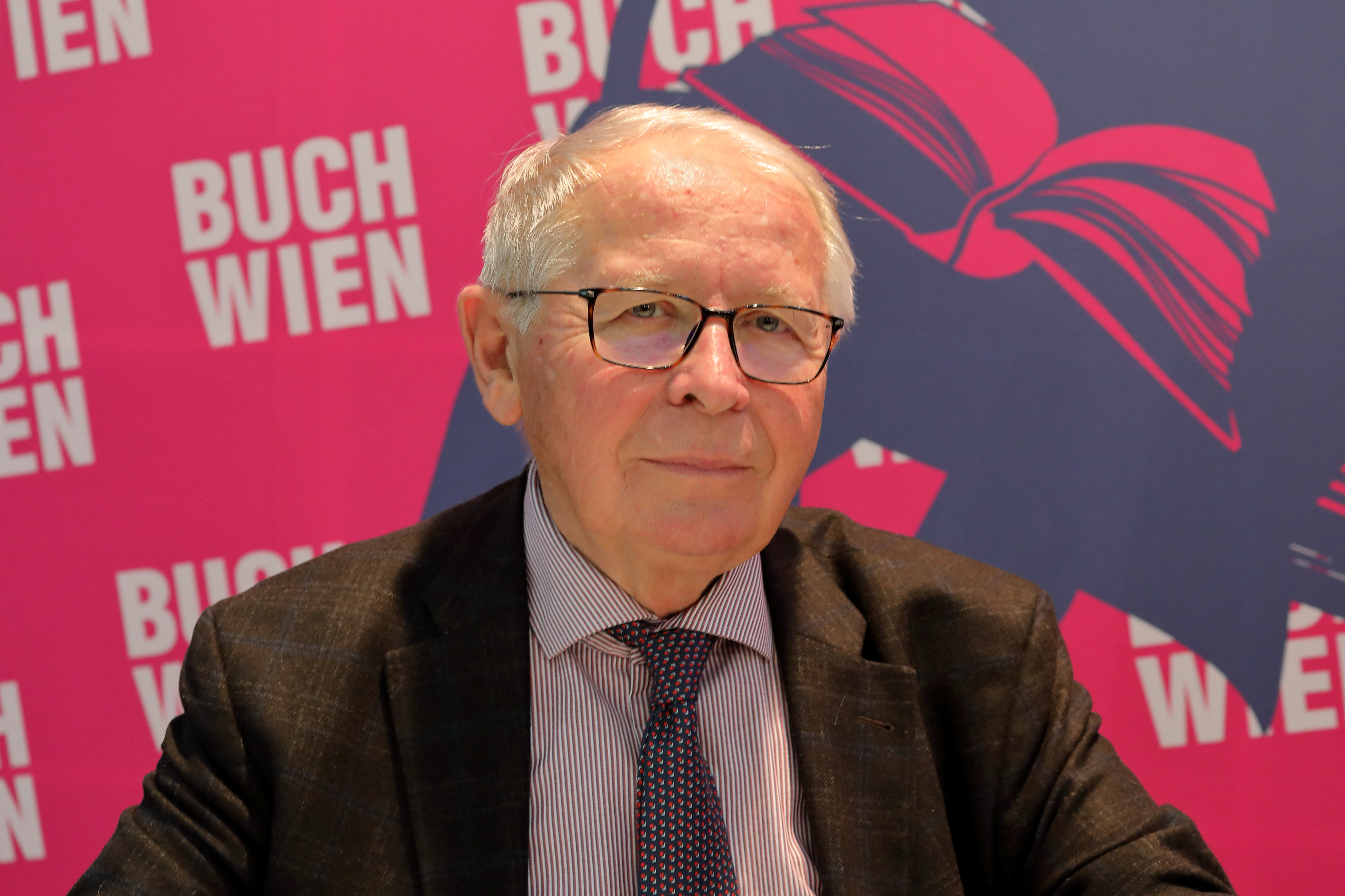 Der österreichische Historiker und Autor Ernst Bruckmüller auf der Wiener Buchmesse 2019.